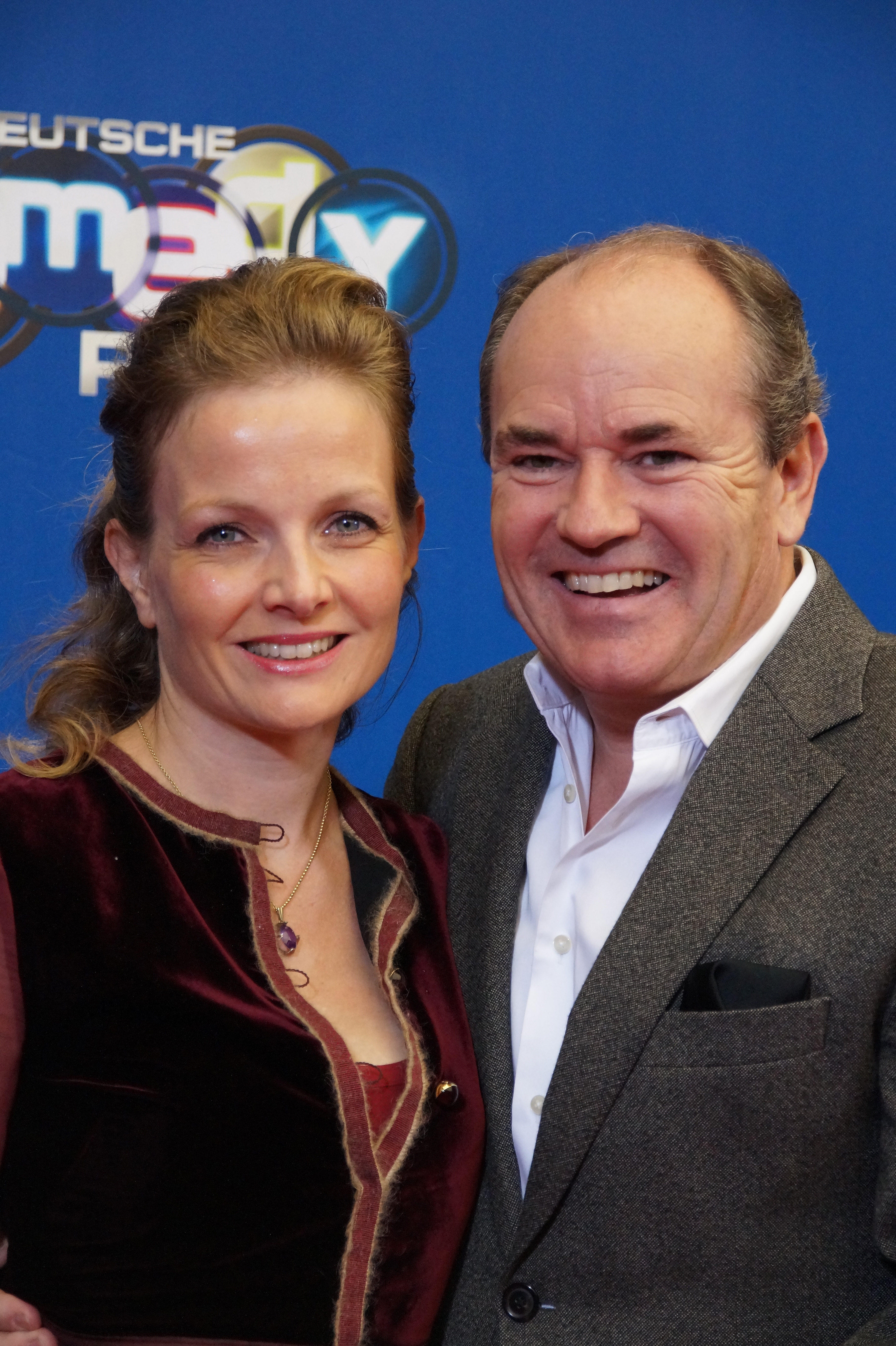 Wolfram M. Kons mit Frau Alexandra beim Comedypreis 2016, Oktober, Köln.